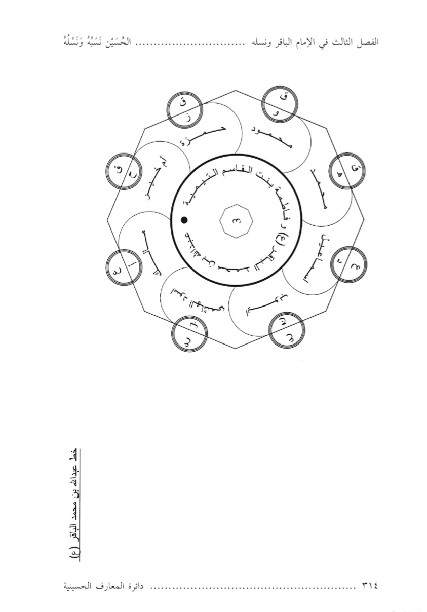 اولاد سید شاہ عبداللہ دقدق دروق